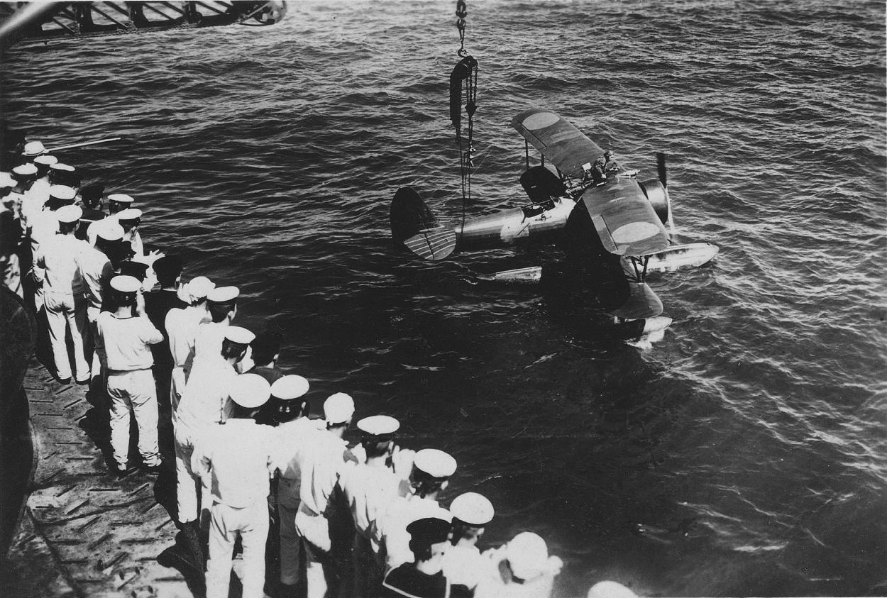 重巡摩耶搭載の95式水偵。